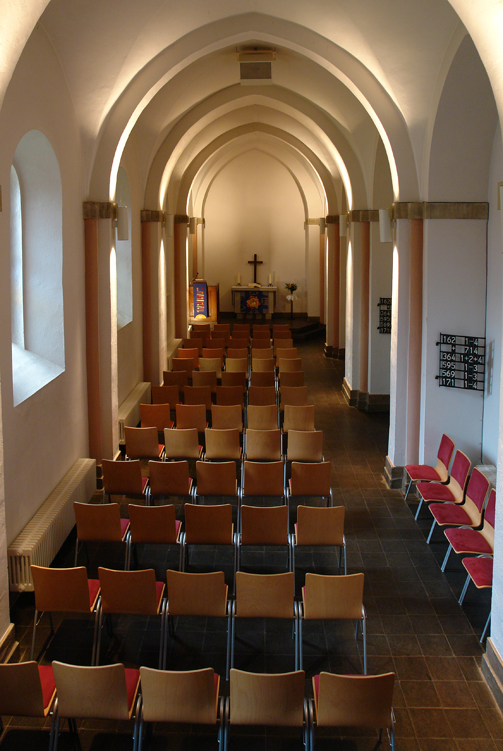 St. Stephani in Bremen: Kapelle im Nordflügel